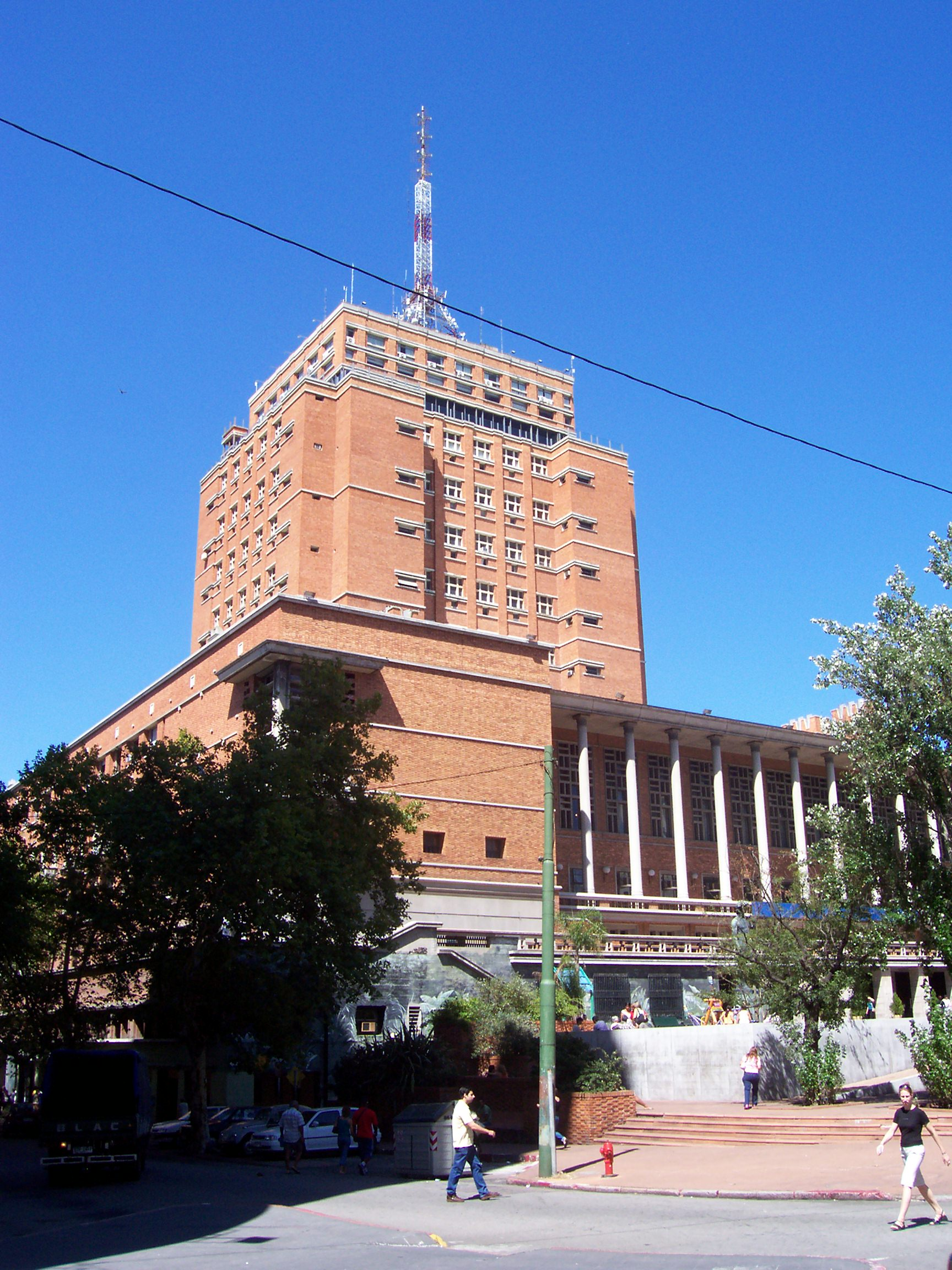 Intendecia Municipal de Montevideo, sede del gobierno departamental.